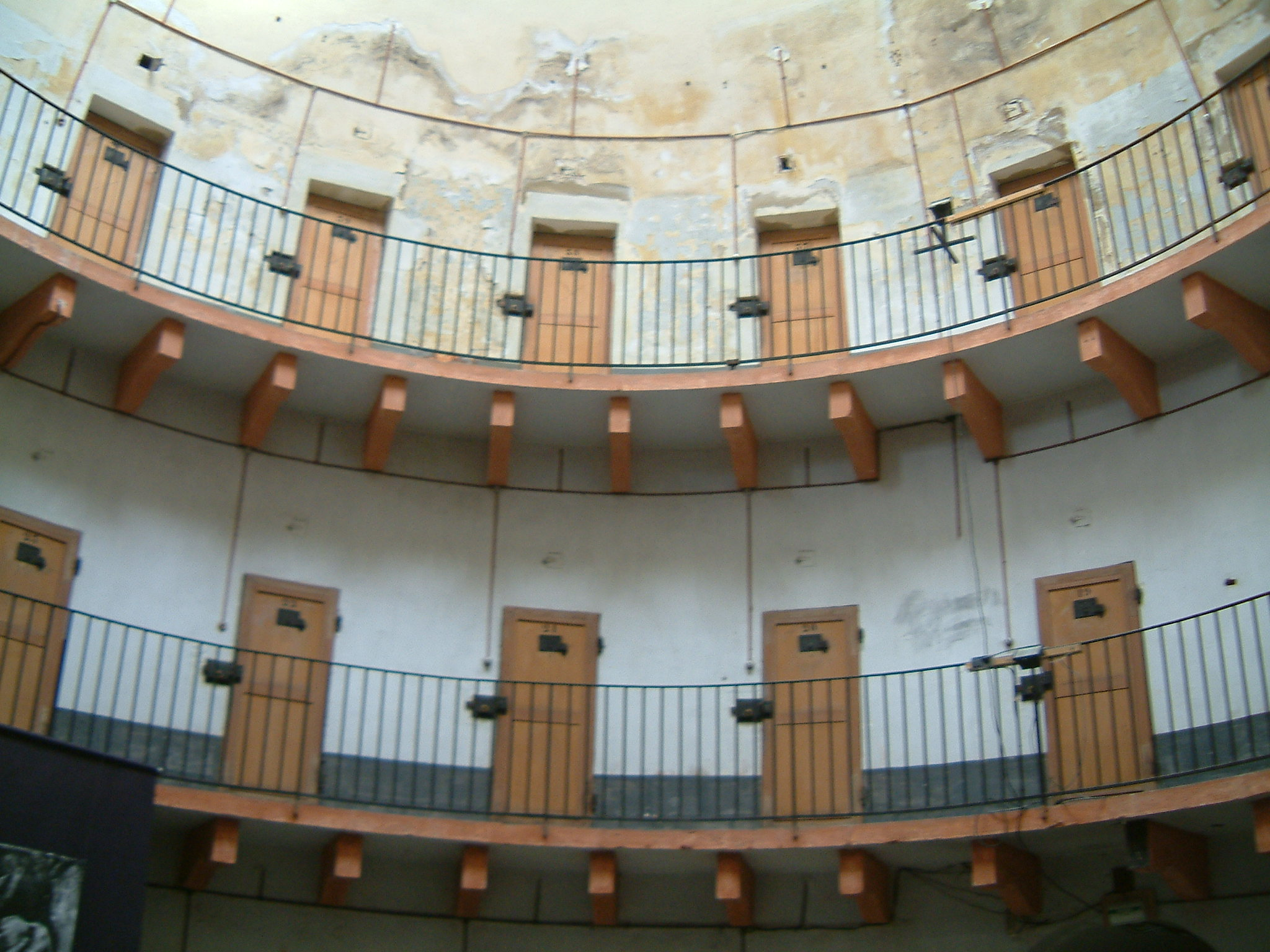 Prison cellulaire, Autun, Bourgogne, FRANCE